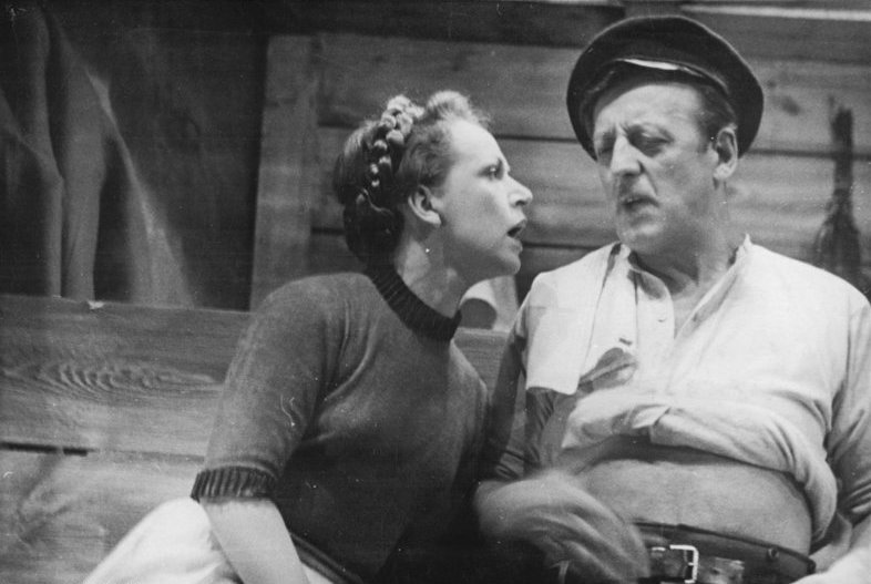 "Herr Puntila und sein Knecht". Am 11. November 1949 gelangt im Deutschen Theater Berlin das Stück von Berthold Brecht "Herr Puntila und sein Knecht" zur Berliner Uraufführung. Die Regie führen Bert Brecht und Erich Engel. Die Musik schrieb Paul Dessau u. die Bühnenbilder schuf Kasper Neher. UBz: Erwin Geschonnek (Matti) - Gisela Trowe (Eva) Aufn: Illus Kemlein 11 7.11.49